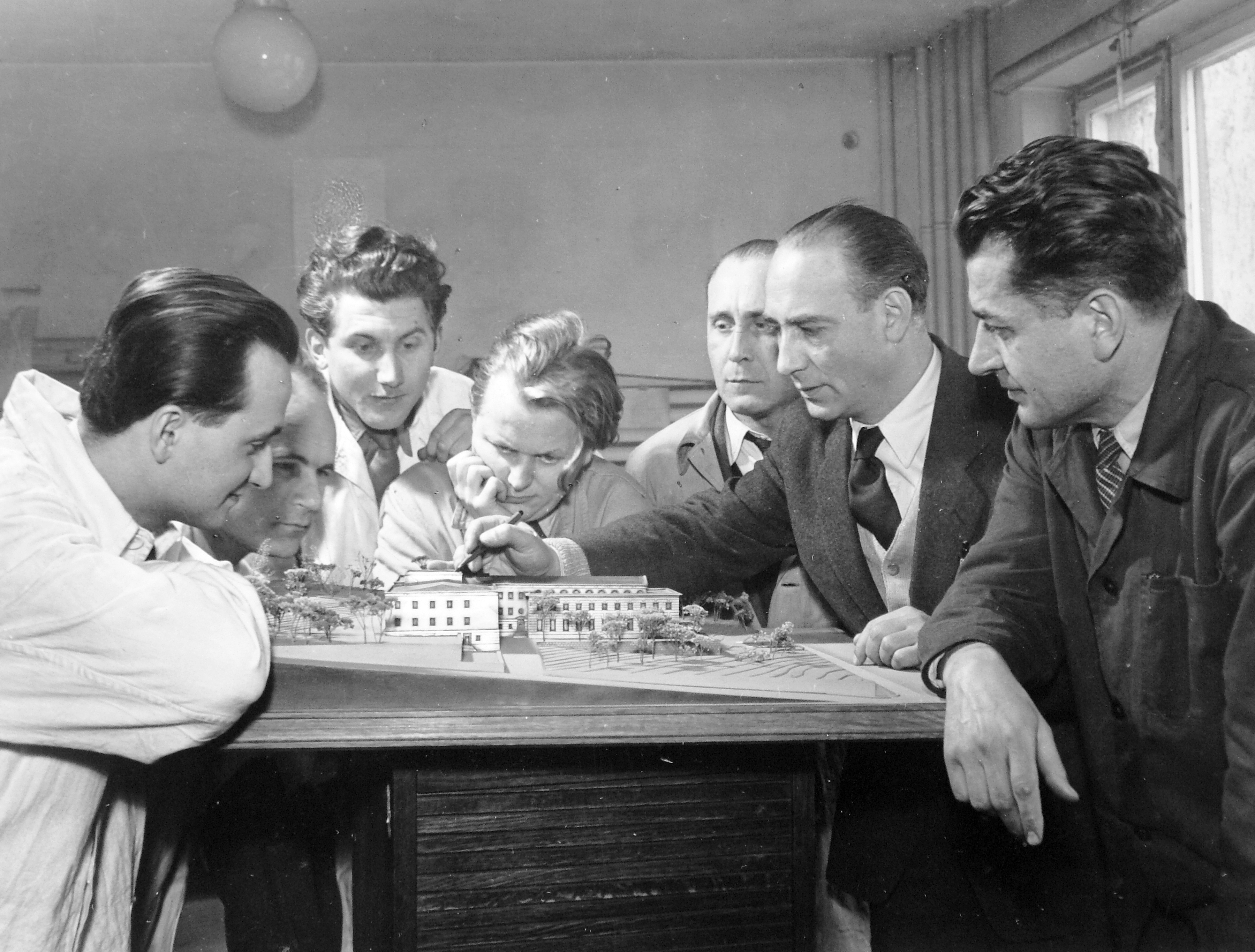 Gádoros Lajos, a Középület Tervező Intézet igazgatója kollégáinak bemutatja a Szinkron-műterem makettjét. Location: Hungary Tags: planning, model, designer Title: Gádoros Lajos, a Középület Tervező Intézet igazgatója kollégáinak bemutatja a Szinkron-műterem makettjét.